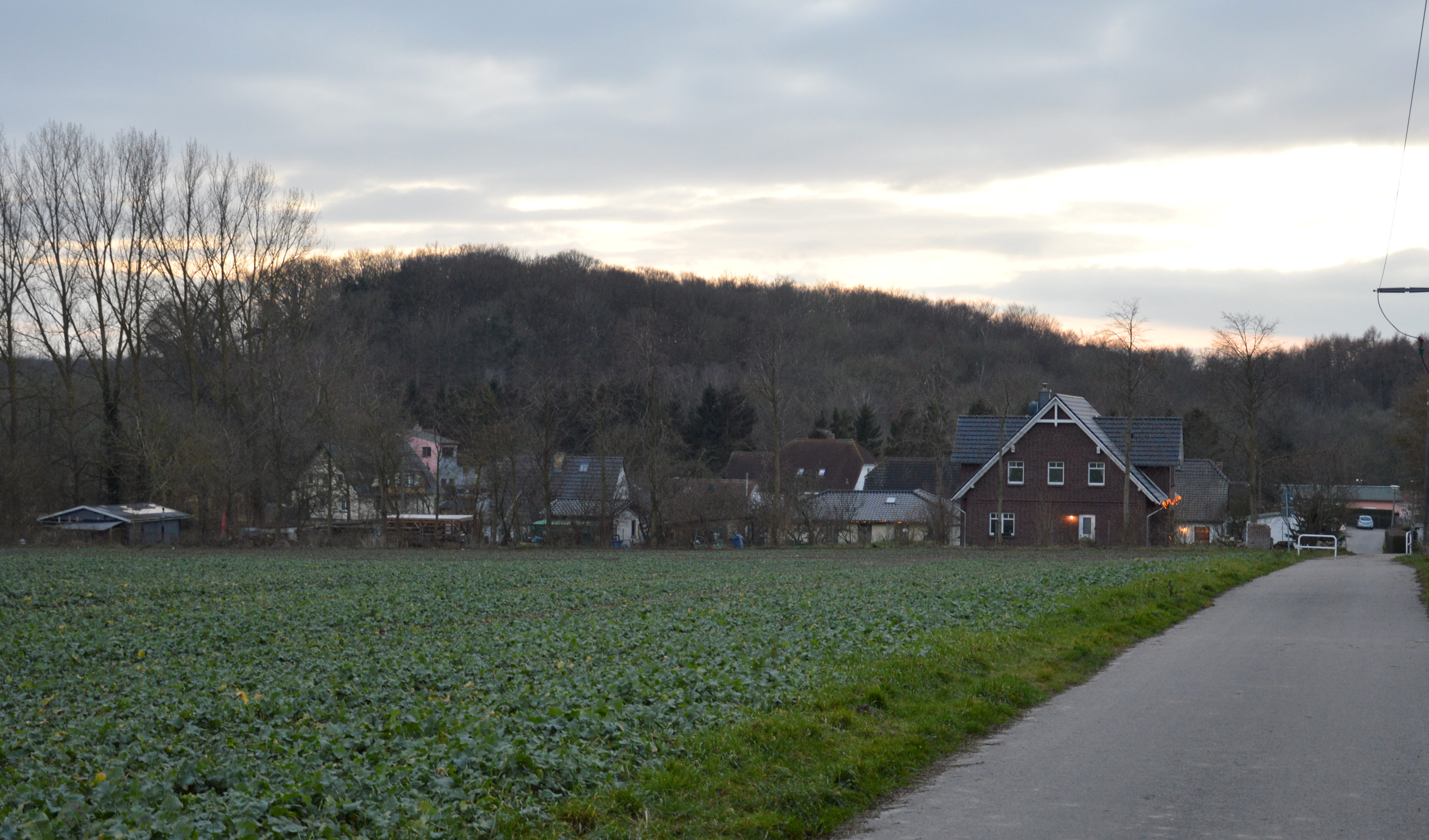 Serams, Blick von Nordosten